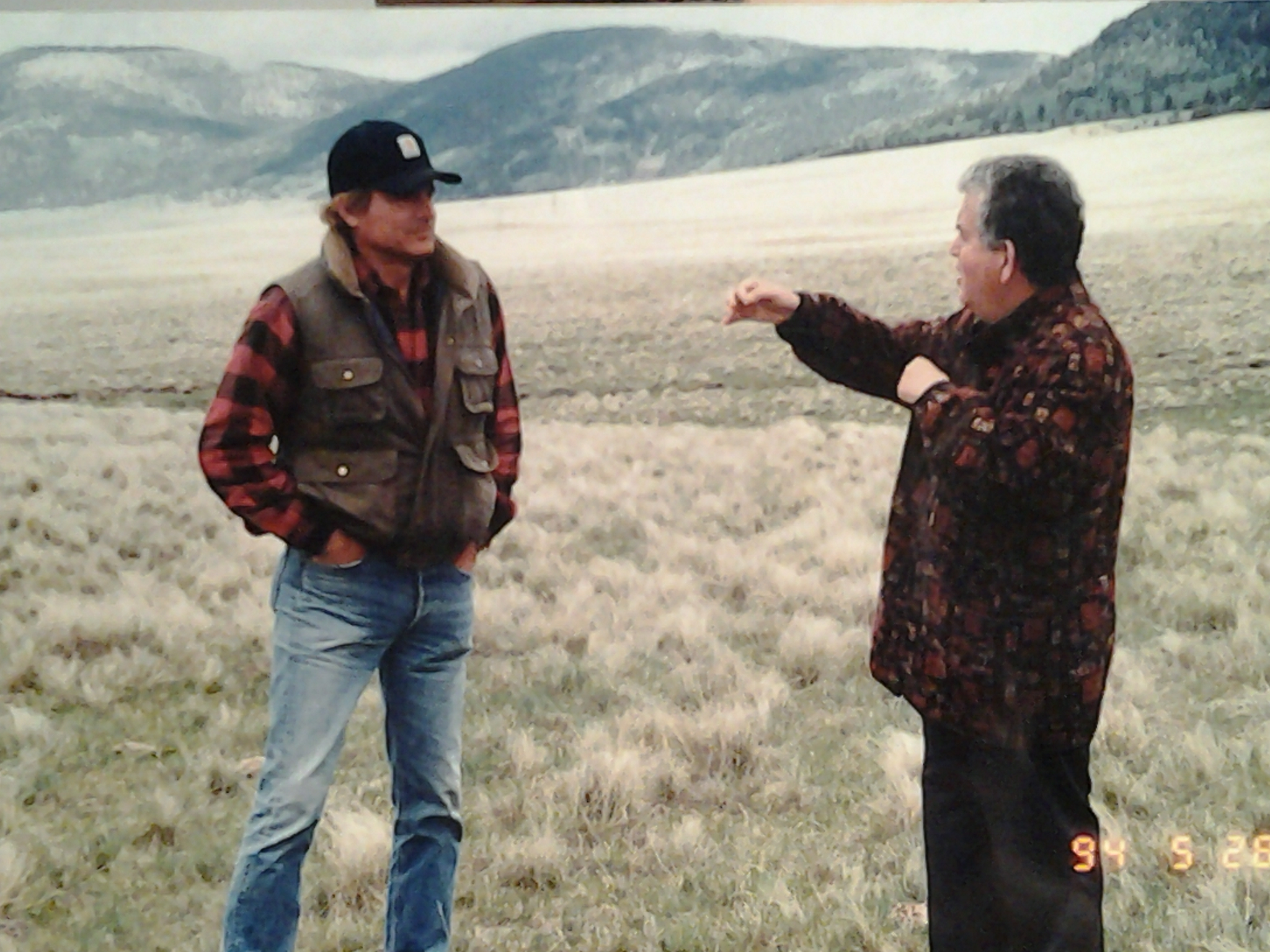 Io e Terence